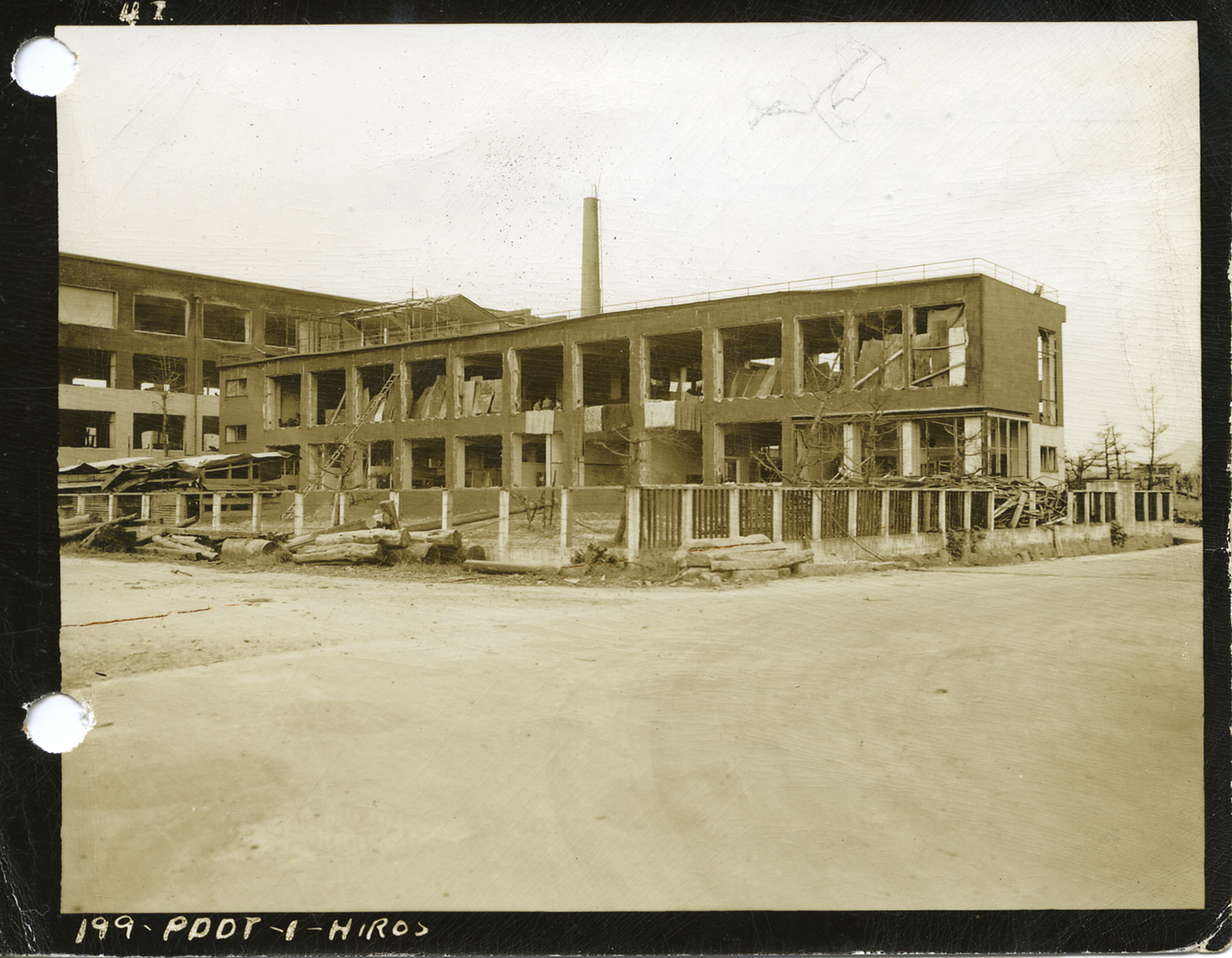 被爆後の広島逓信病院